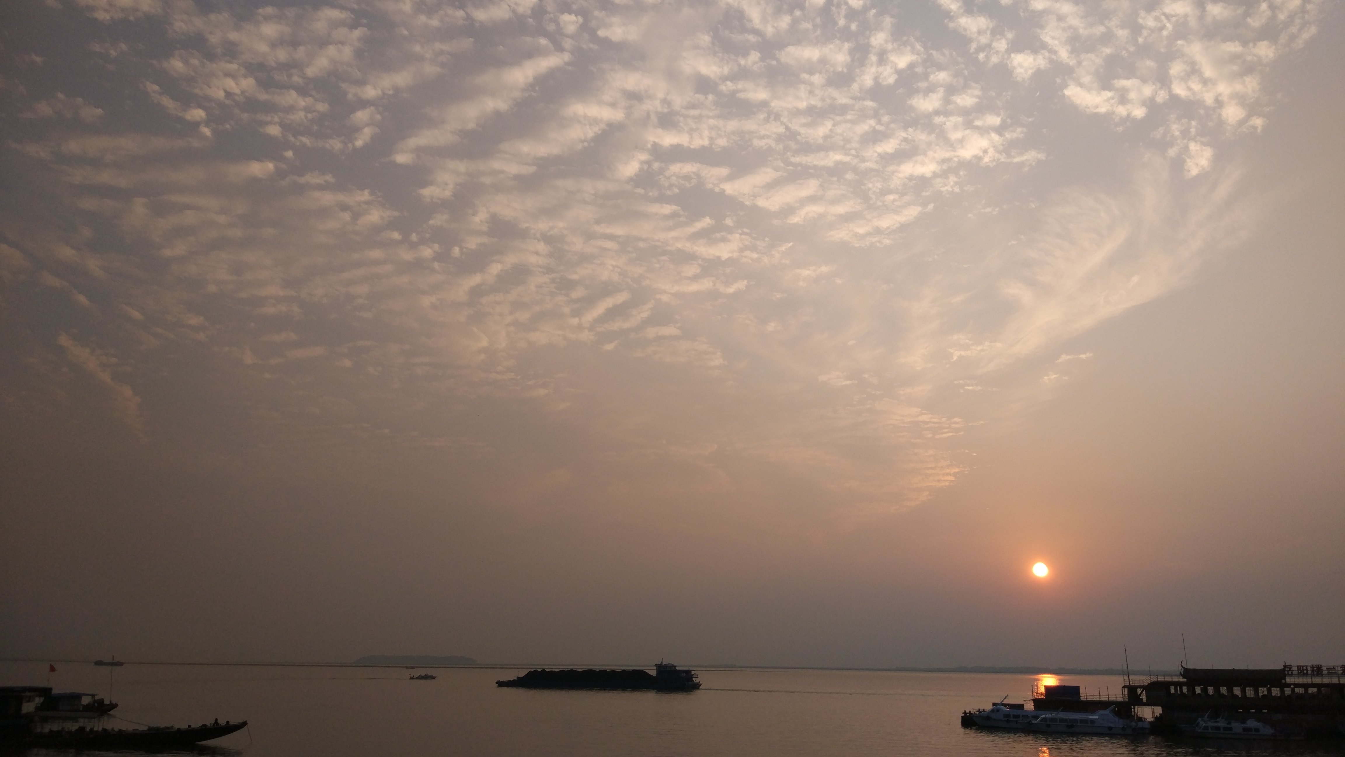 中文（中国大陆）: 巴陵广场拍摄洞庭湖